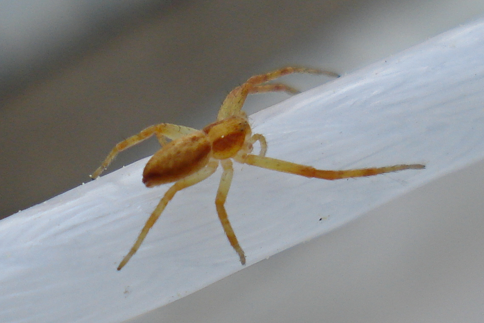 Araña na Estrada. Galiza